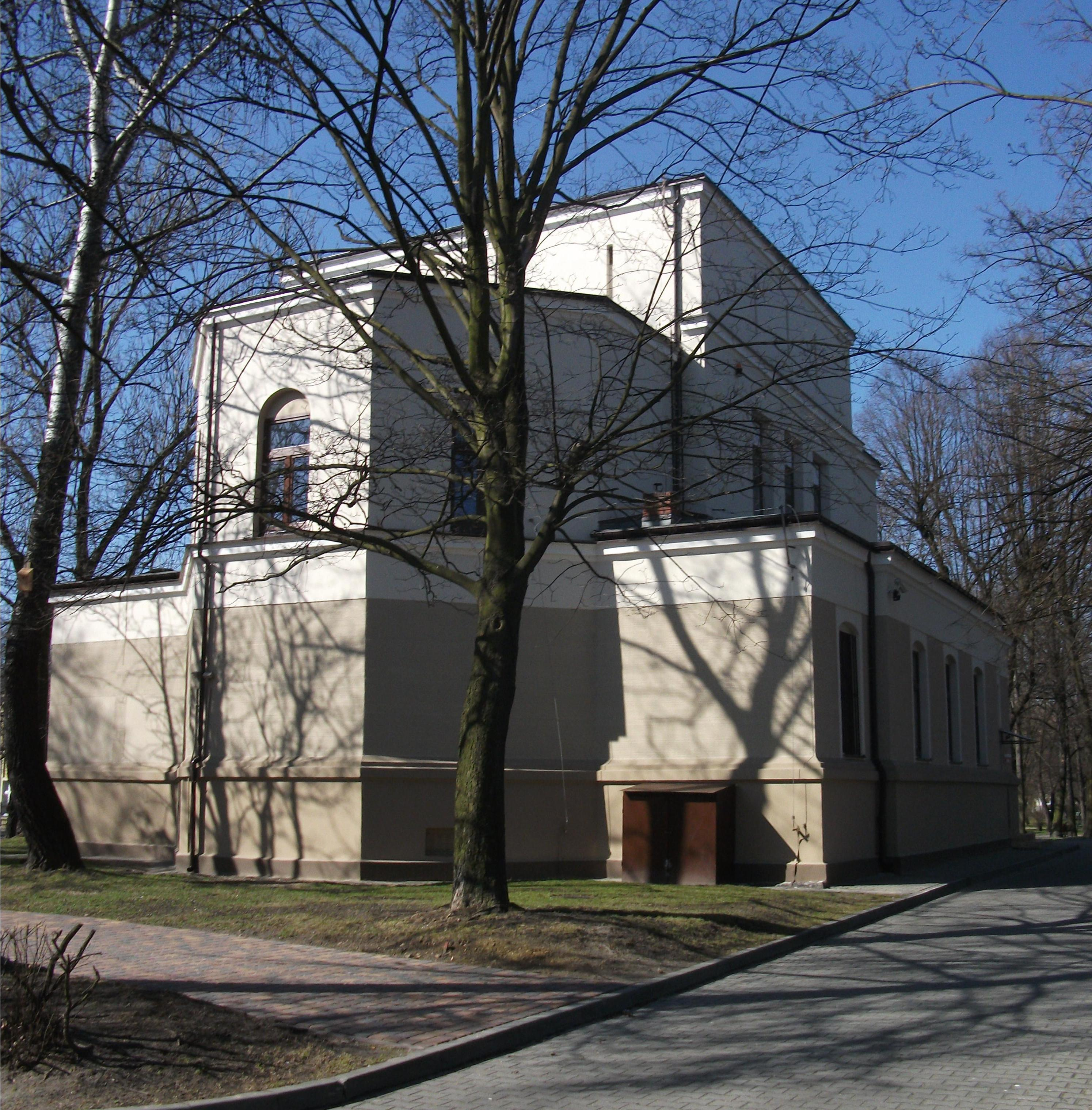 Była cerkiew NMP, obecnie siedziba Wieluńskiego Domu Kultury